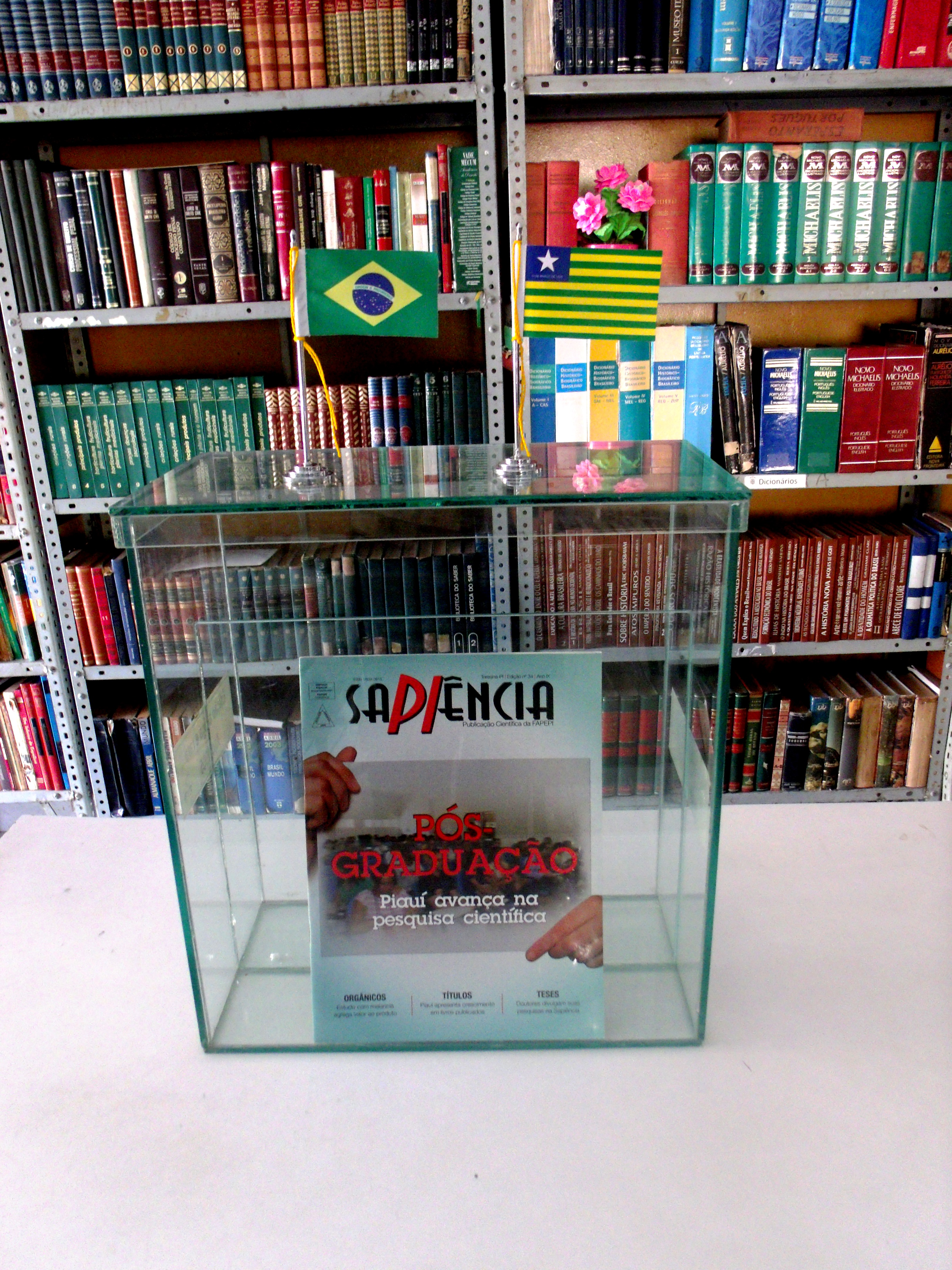 Exposição da Fundação de Amparo à Pesquisa do Estado do Piauí em biblioteca pública.